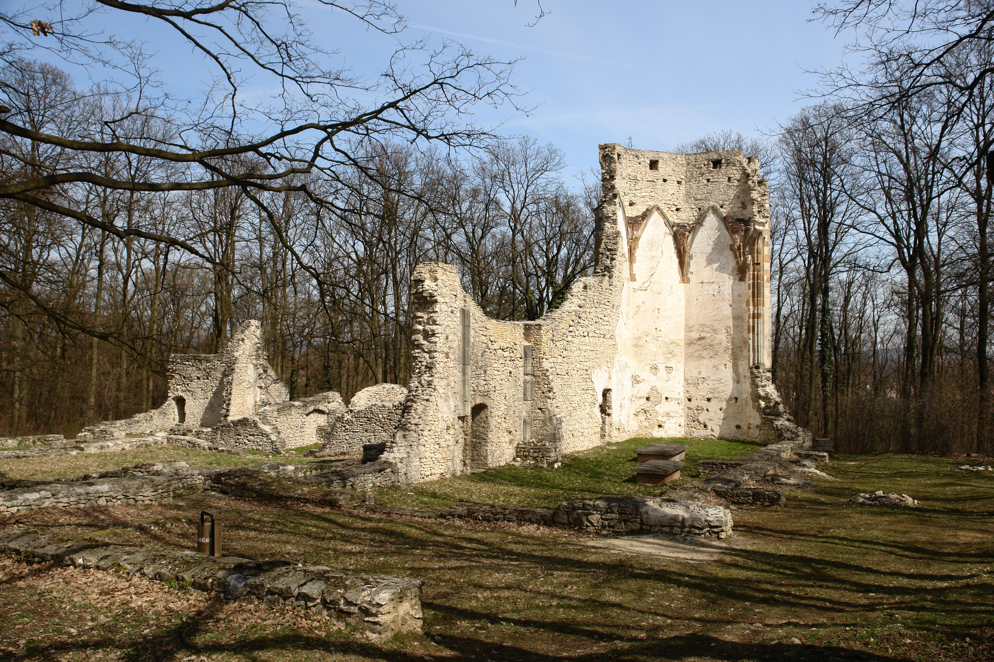 Pálos templom- és kolostorrom, Nagyvázsony-Barátipuszta This is a photo of a monument in Hungary. Identifier: 18170